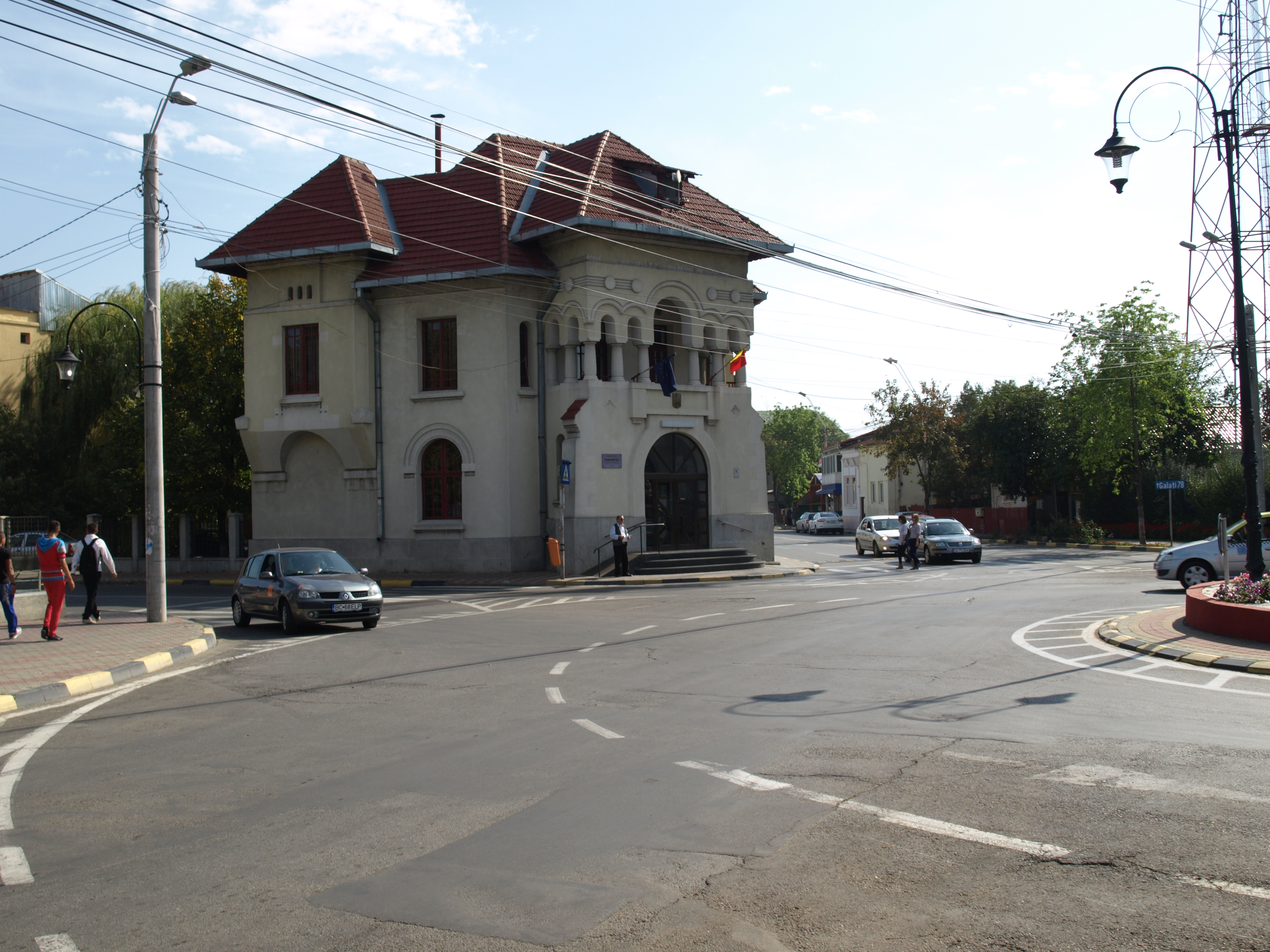 Banca de Scont, azi Parchetul Tecuci